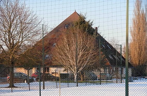 Le centre de formation de l'AJ Auxerre surnommé la "Pagode".